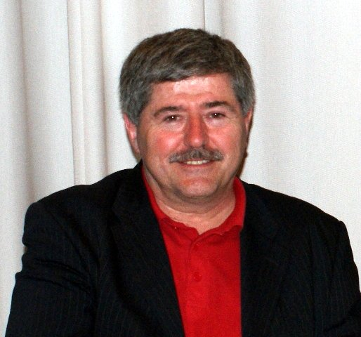 Spidskandidat for Folkebevægelsen mod EU til EP-valget 2009, Søren Søndergaard, ved debatmøde i Aalborg.